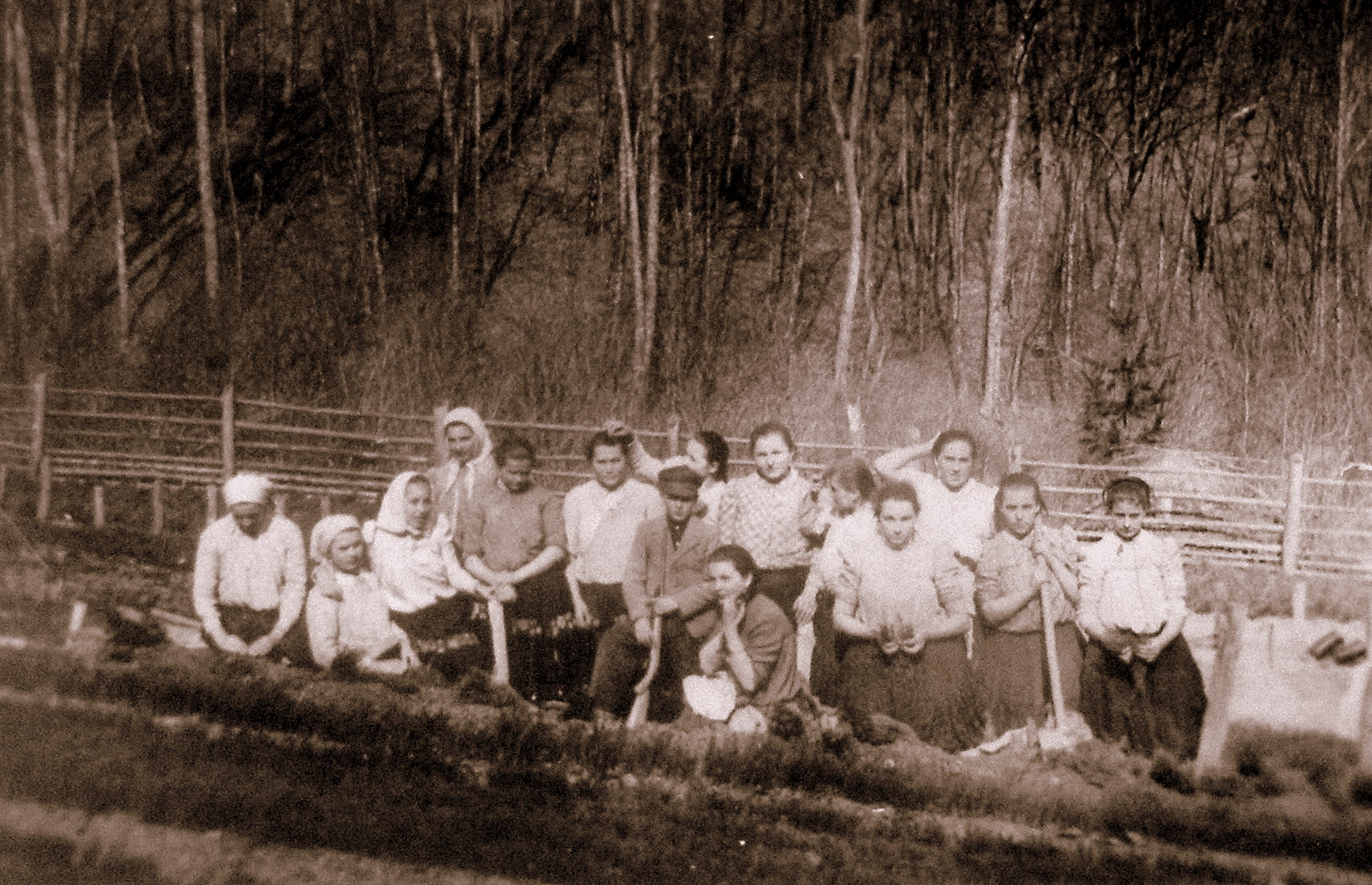 Sedlice, miestna mládež z obdobia Slovenského štátu pri práci v lesnej škôlke